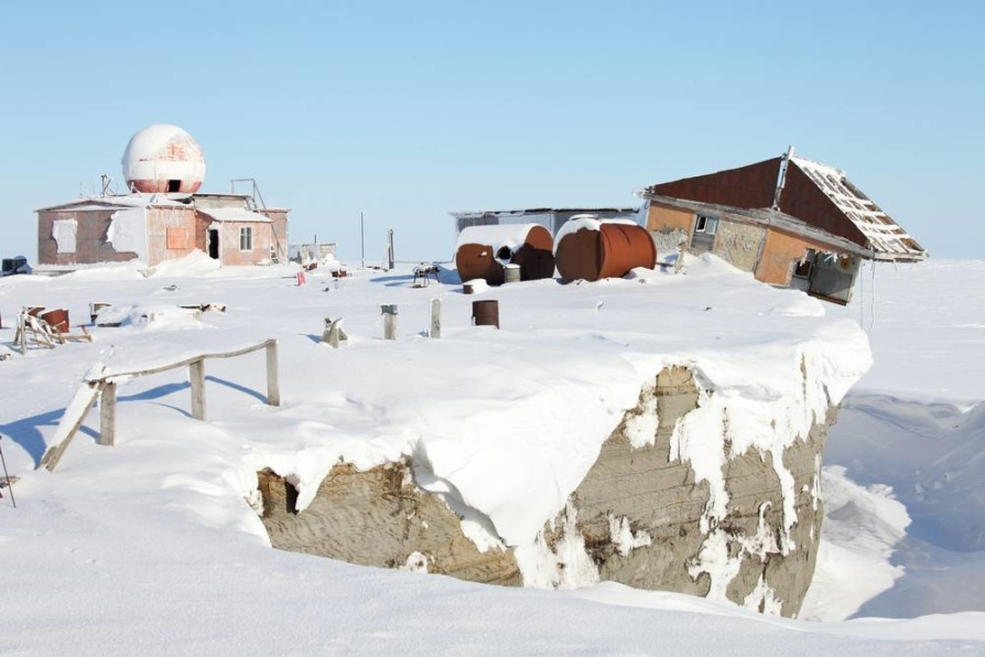 Берег острова Визе